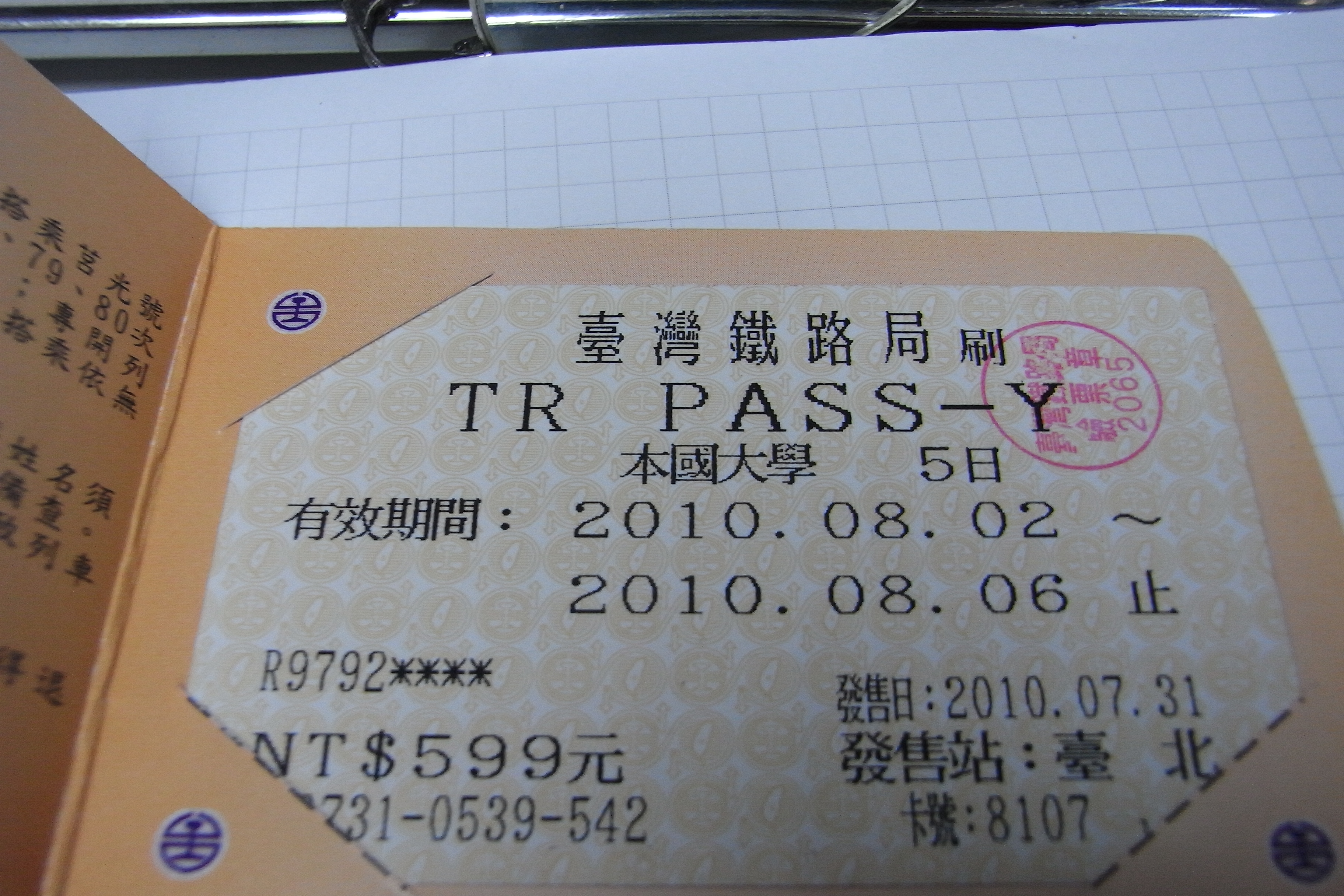 中文（台灣）: 臺灣鐵路管理局臺北車站售出的臺灣鐵路周遊券學生版五日券，售價新臺幣599元。